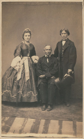 Сям'я Здановічаў: Ігнат Аляксандравіч Здановіч, Аляксандр Здановіч